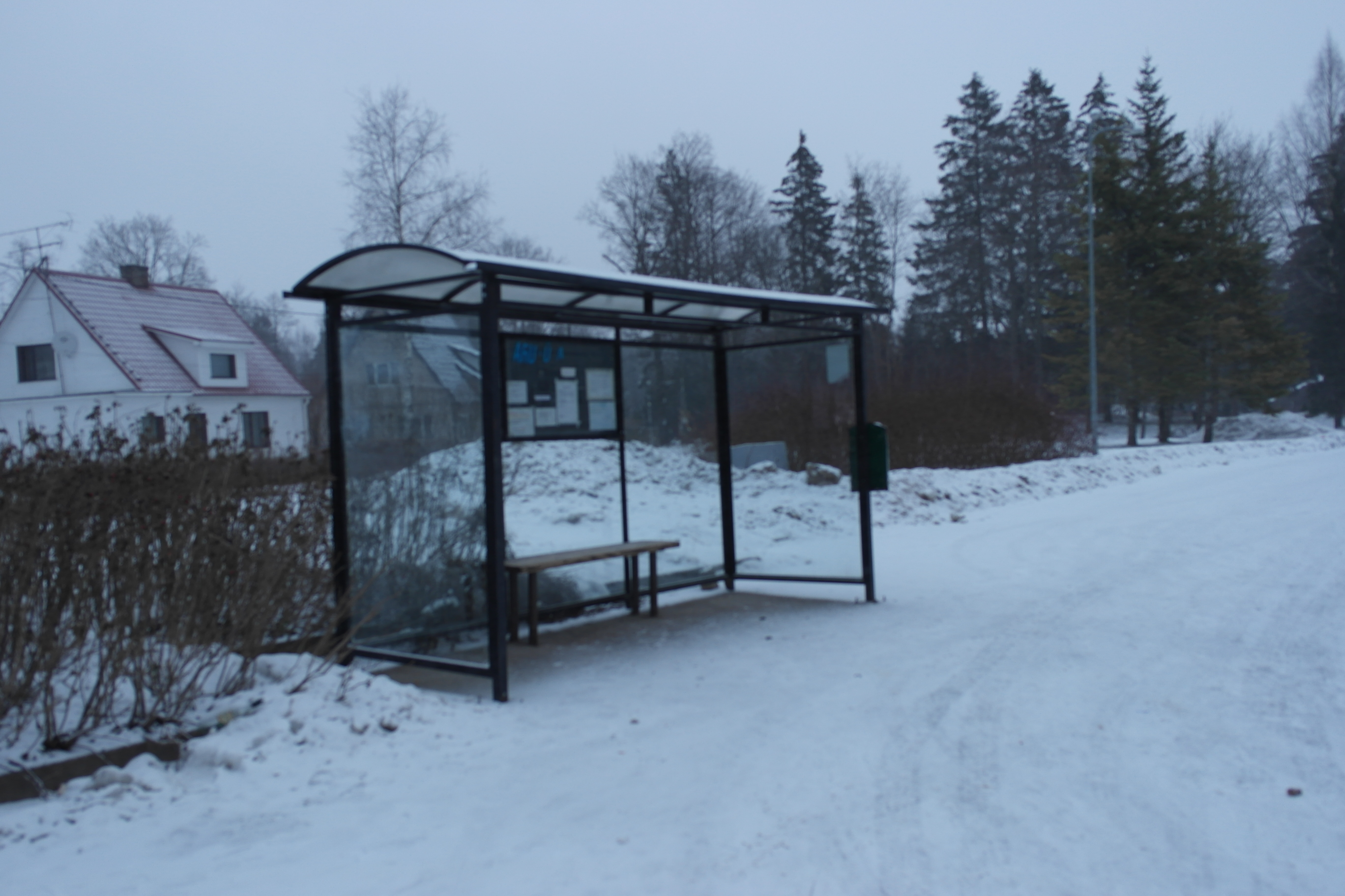 Aruküla bussipeatus.